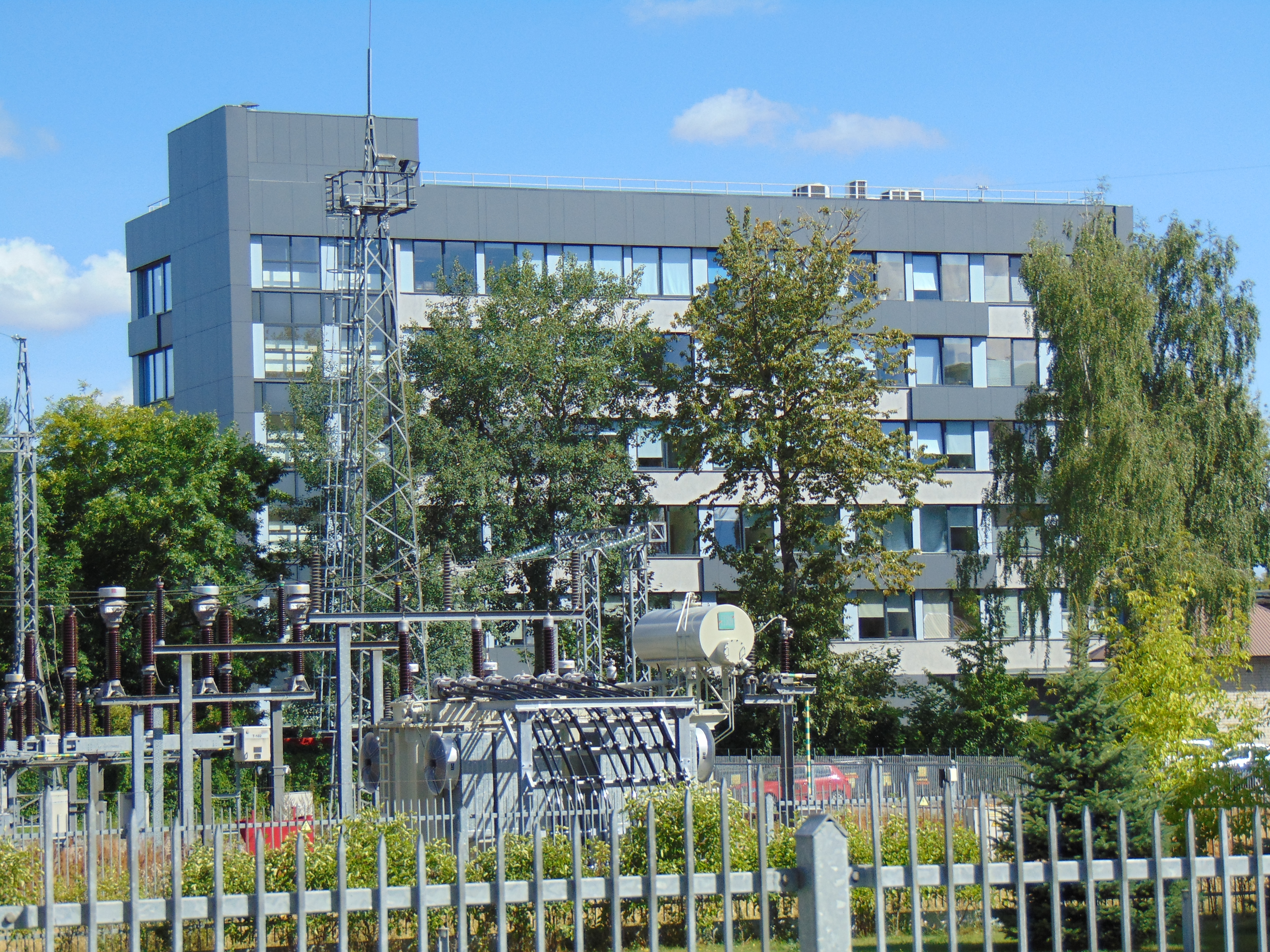 Viešųjų pirkimų tarnyba